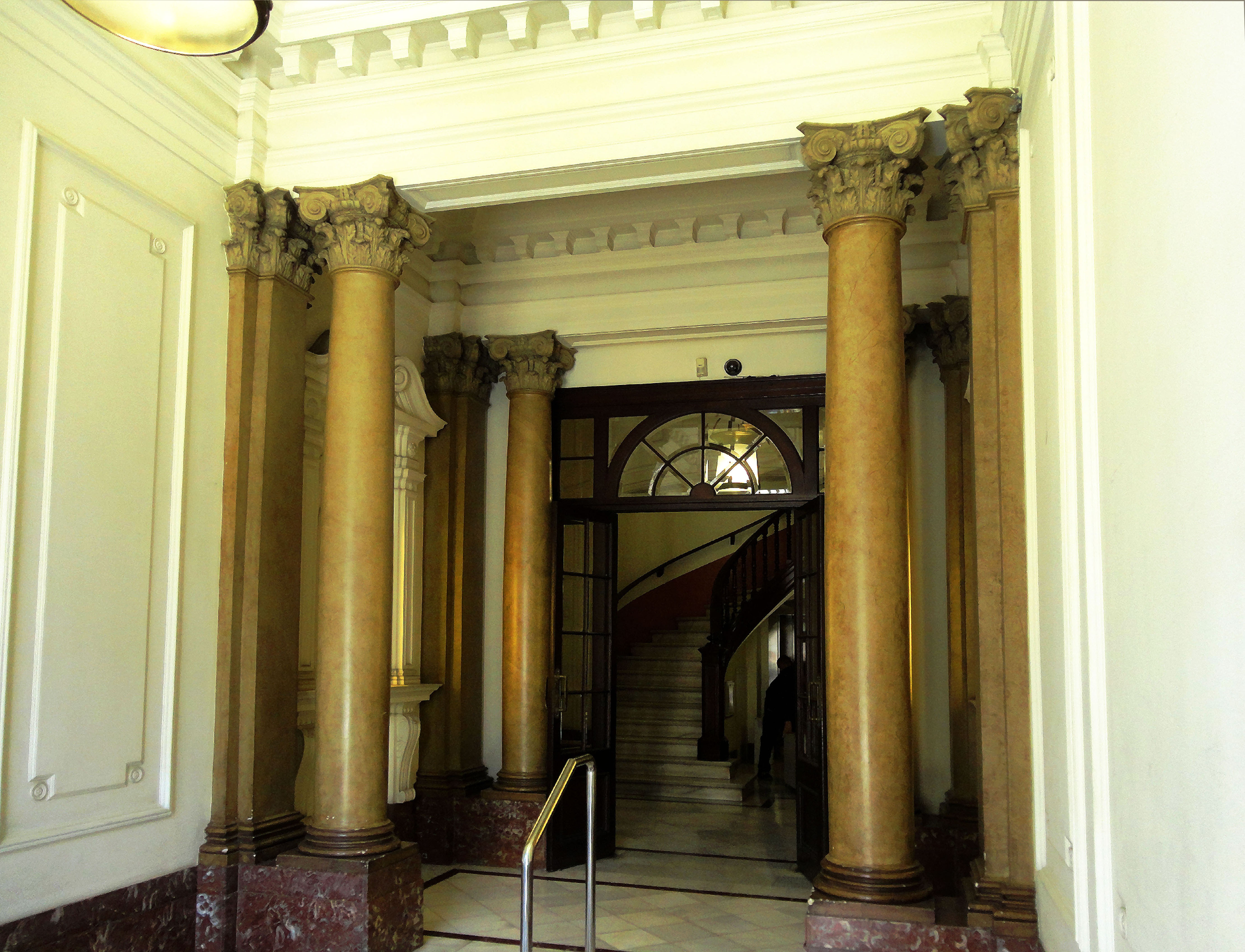 1948-Passeig de Gràcia 74. Tarafa (vídua de Pau), agent d'assegurances, en el 2º 1ª. 1961-Passeig de Gràcia 74.Freixes (Miquel), sastre. Maes, taller de brodats. Rull Stat. Anònima, articles per a sanitaris i desanejament. Suizo (El), brodats, blondes i puntes. 2015-Passeig de Gràcia 74. DIOR, perfums, maquillatges, tractaments de bellesa, regals per la dona i home. Bulgari, joieria, perfumeria, marroquineria, rellotgeria.